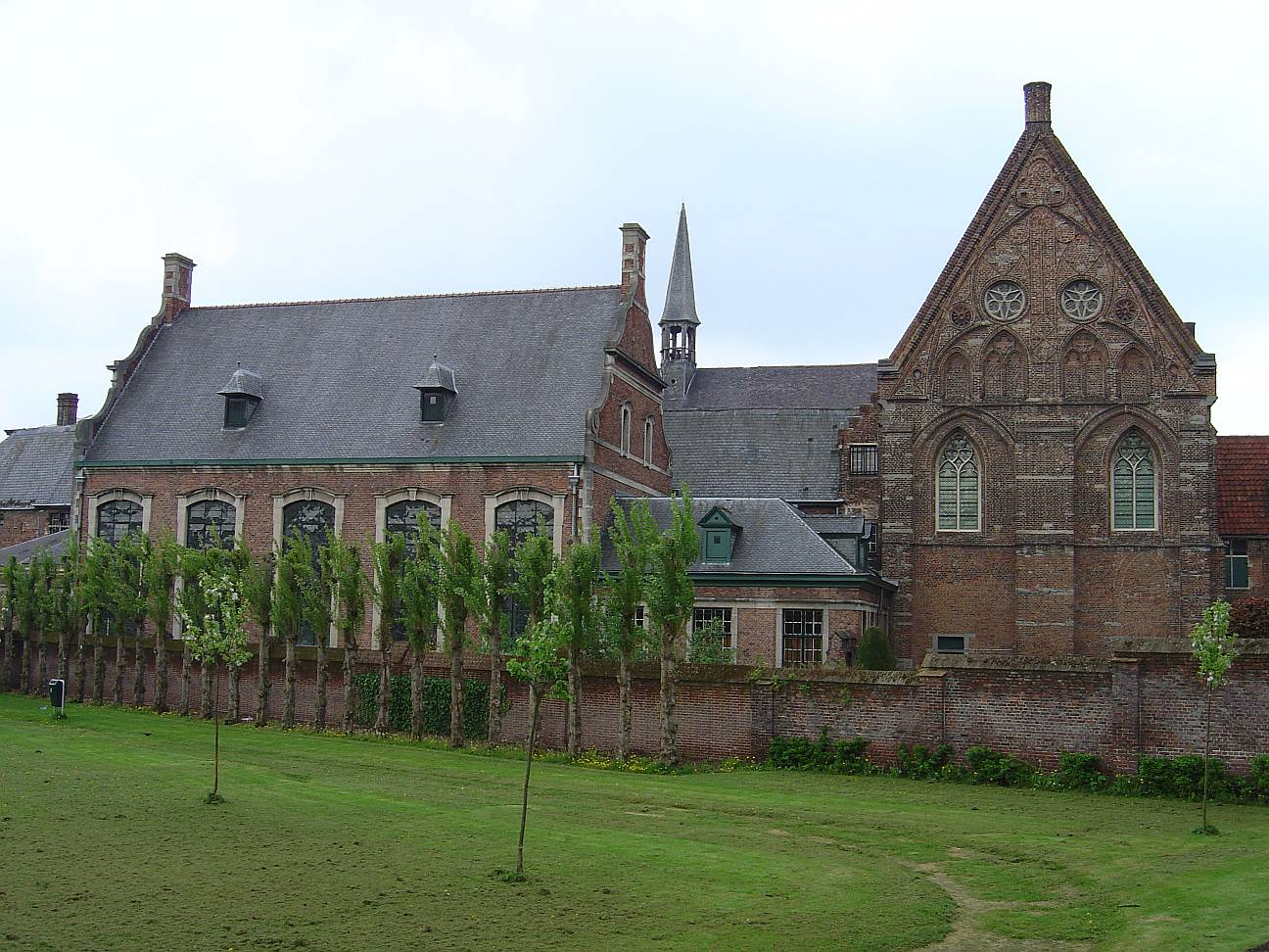 De Bijloke Abdij, voormalig ziekenhuis, nu museum, in Gent